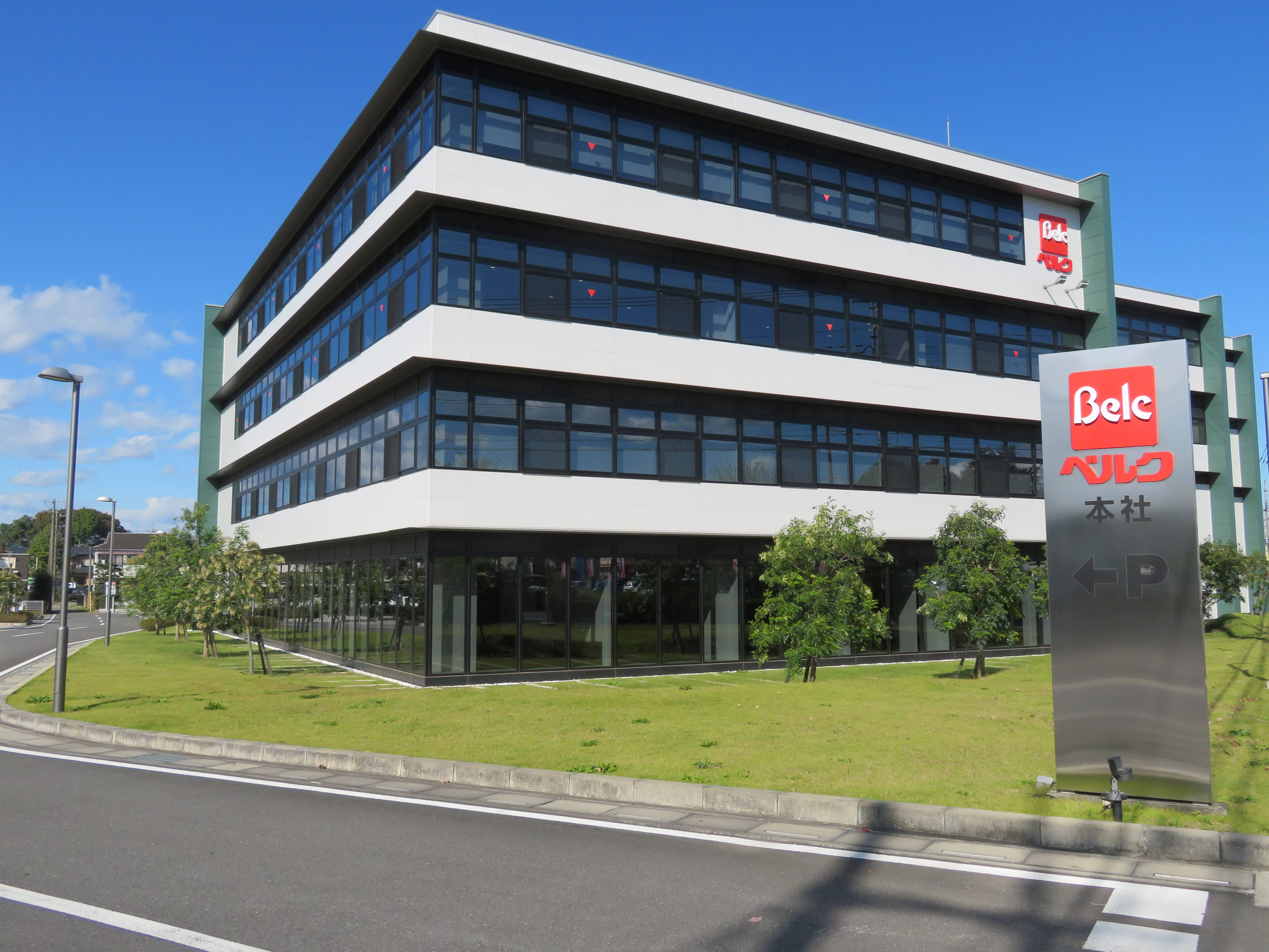 埼玉県鶴ヶ島市に所在する株式会社ベルク（本社）